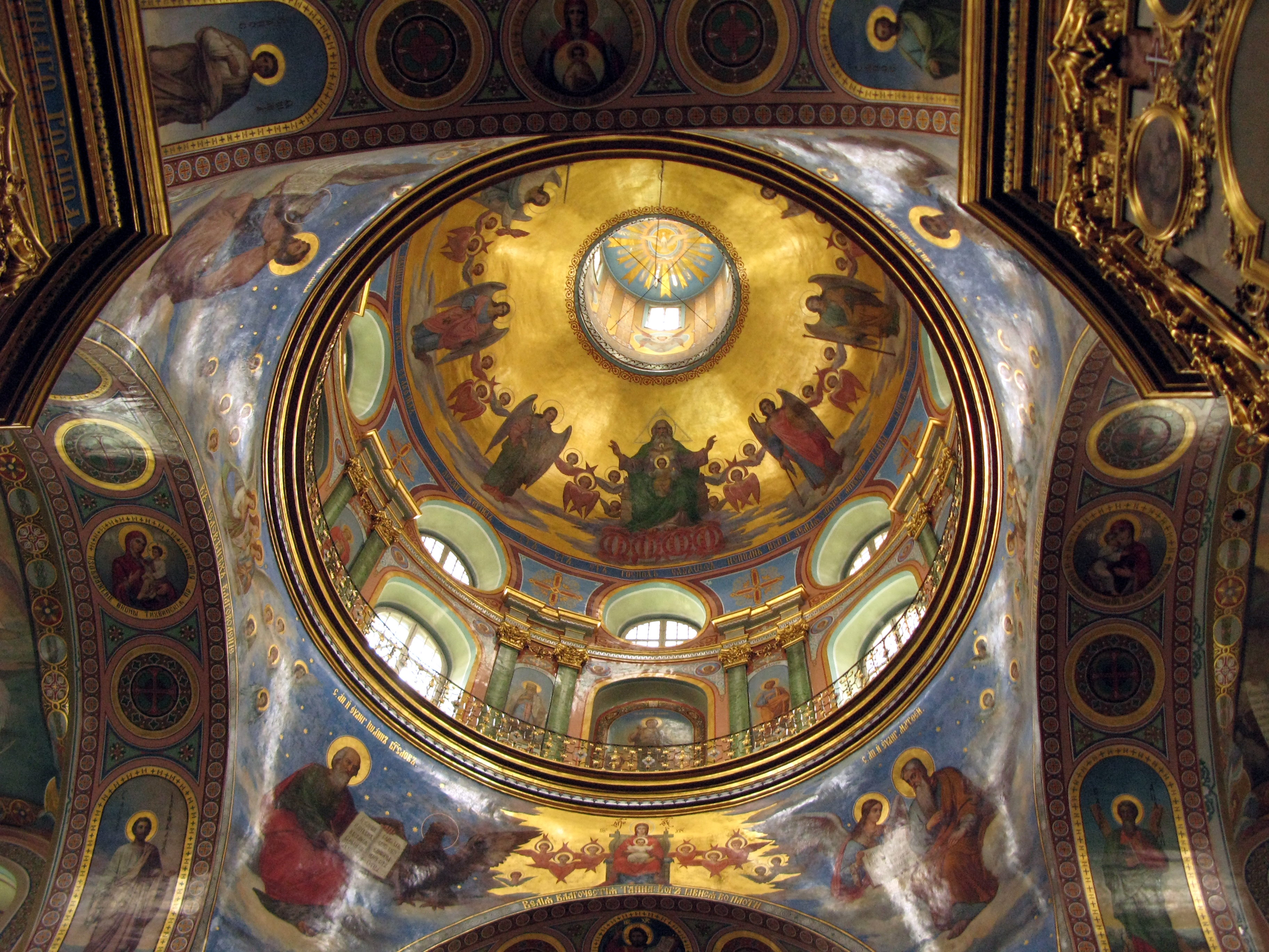 Успенський собор, Почаїв, пл. Возз'єднання